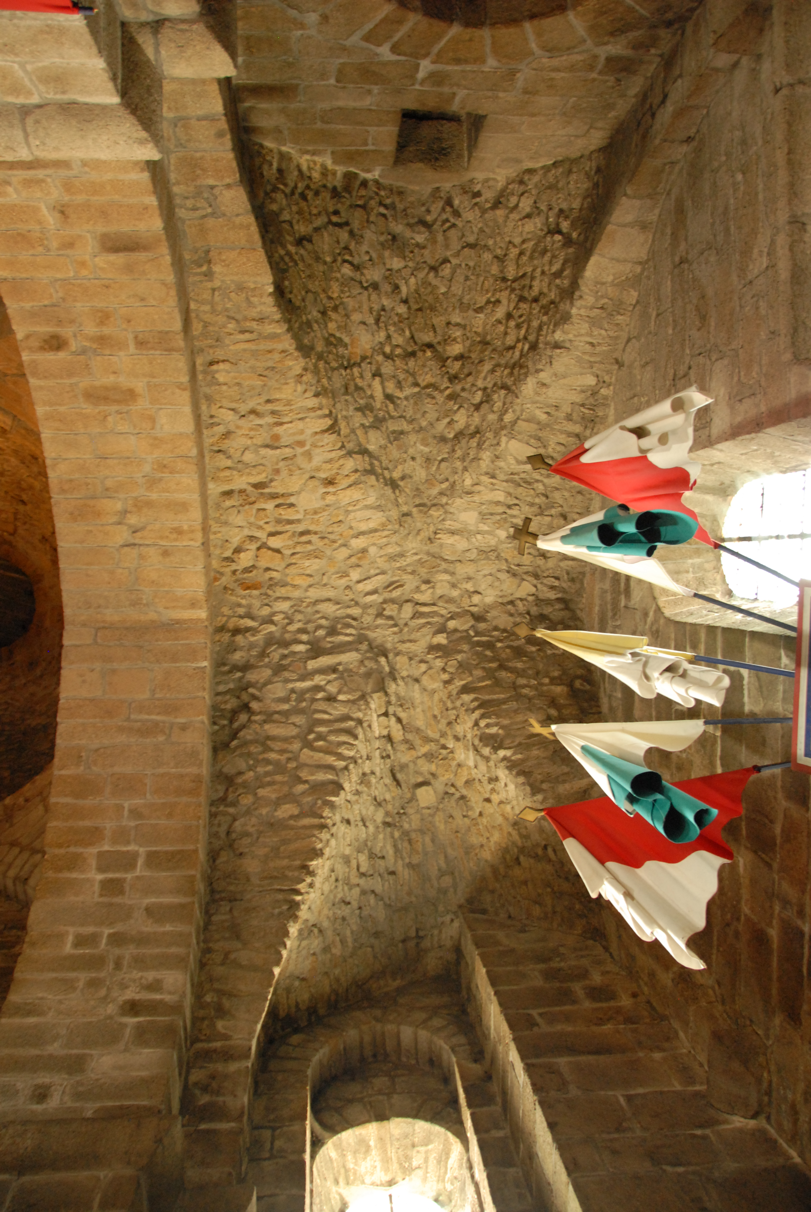 St-Junien, Kreuzgradgewölbe, südl. Seitenschiff, Joch 1